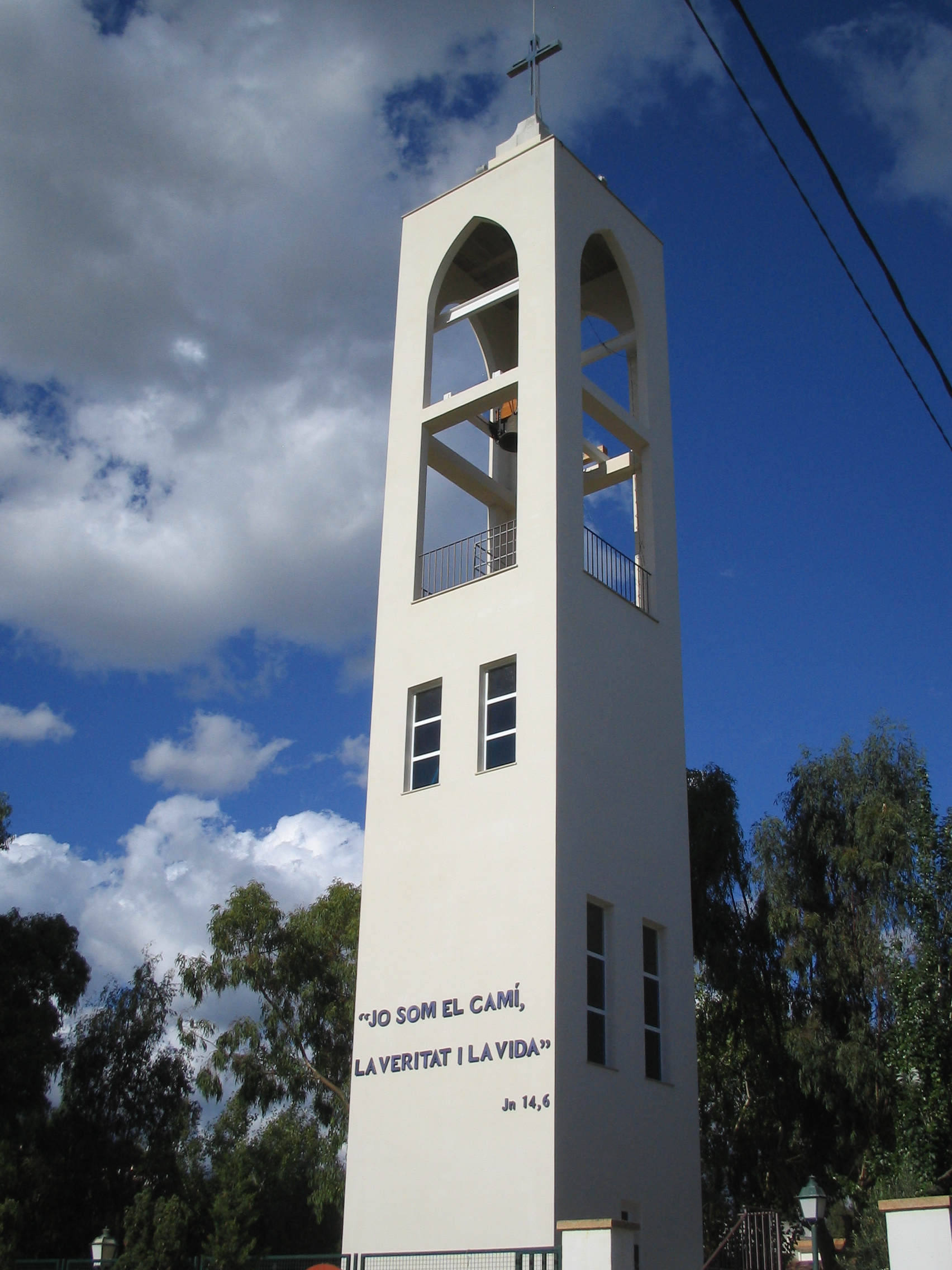 Parroquia de Santa Ponsa.